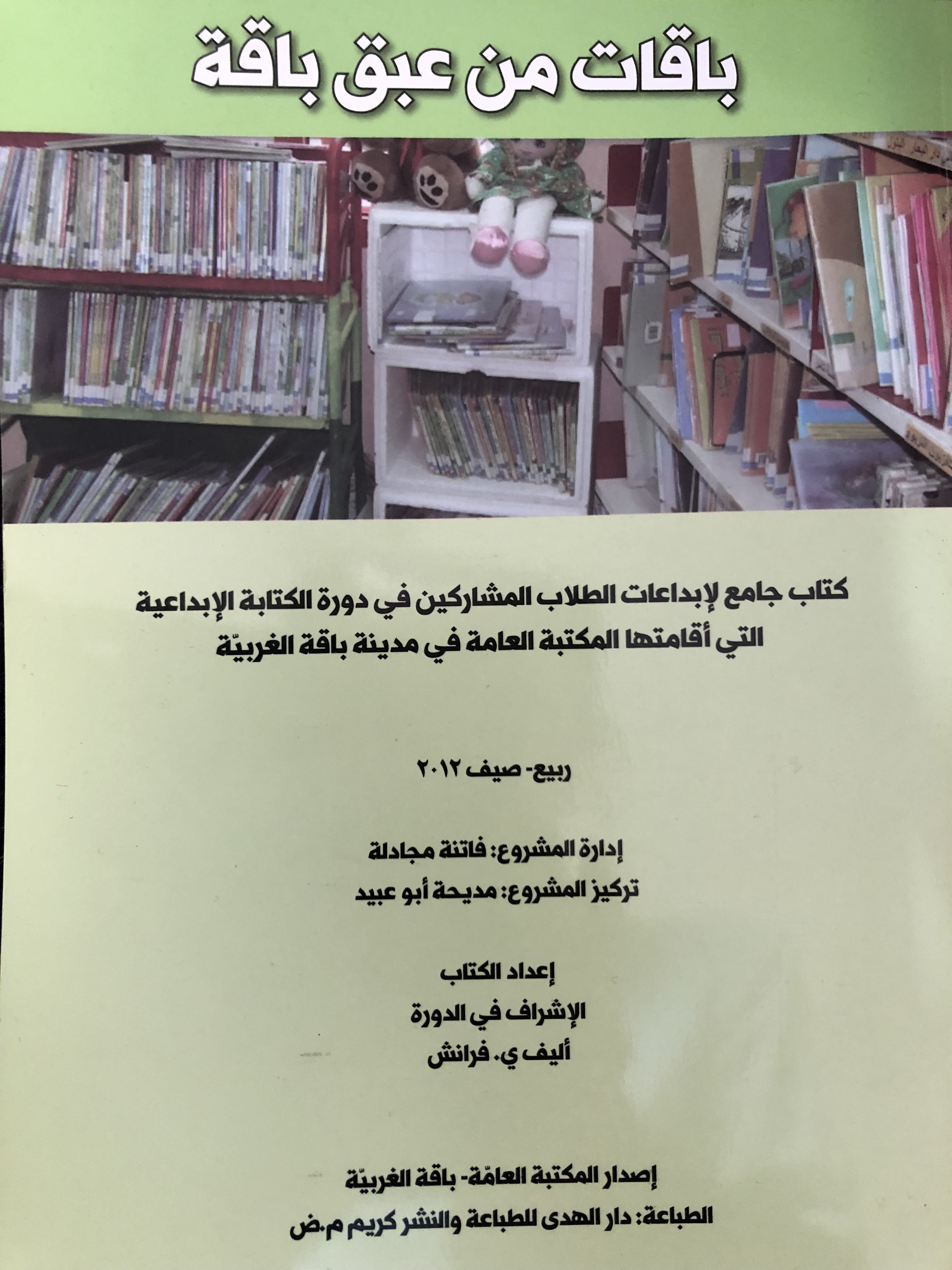 ספר היצירות מפרי עטם של תלמידי חטיבות הביניים שהשתתפו בקורס כתיבה יוצרת בהוצאת הספרייה העירונית